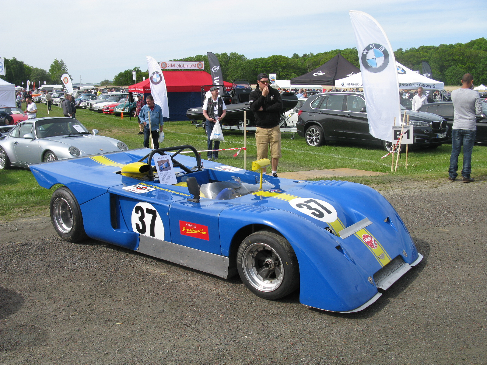 Chevron B19